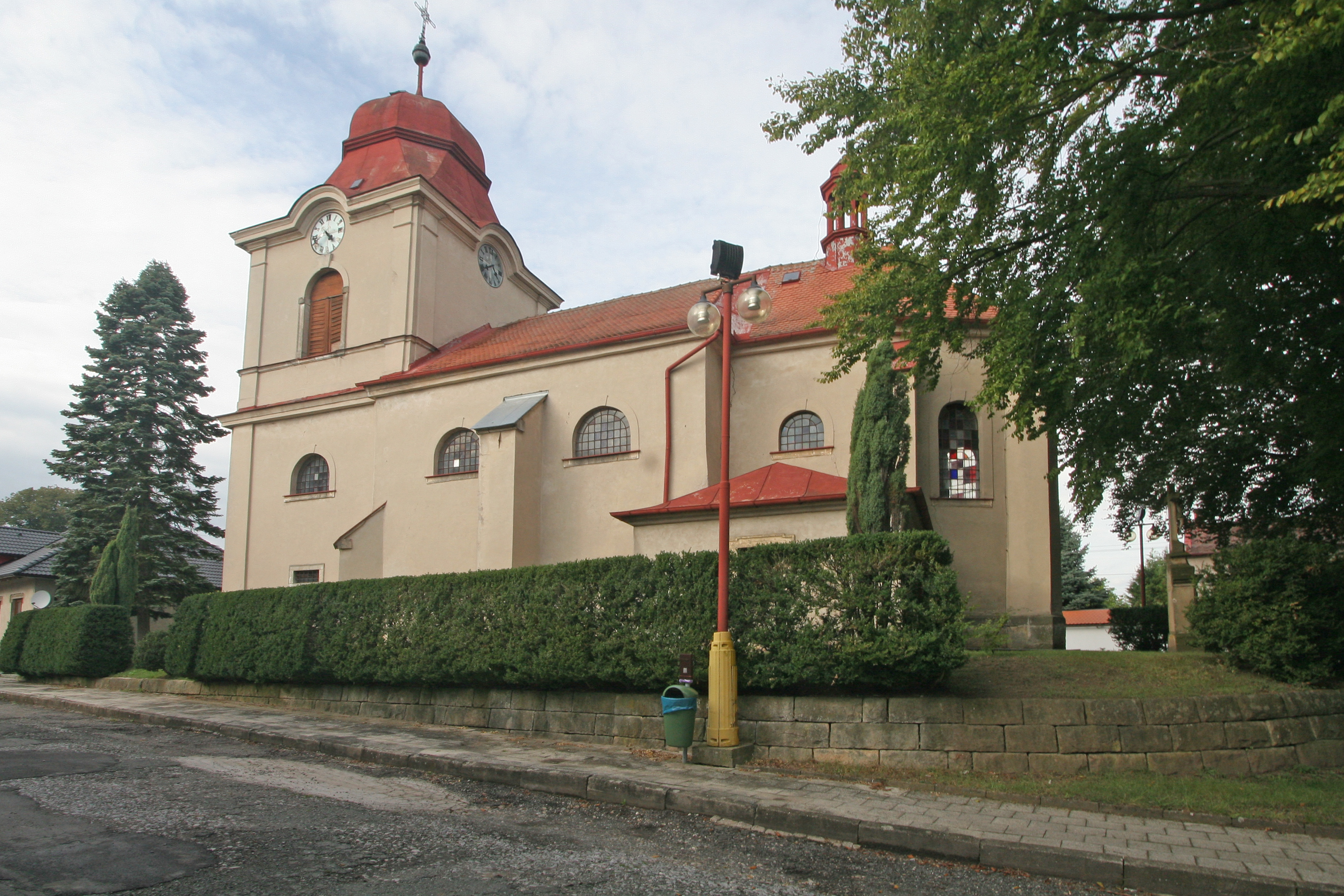 Kostel Všech svatých (Velký Vřešťov), střed obce, Velký Vřešťov